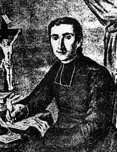 Abbé Jean-Baptiste Favre (1727-1783) (Hérault)